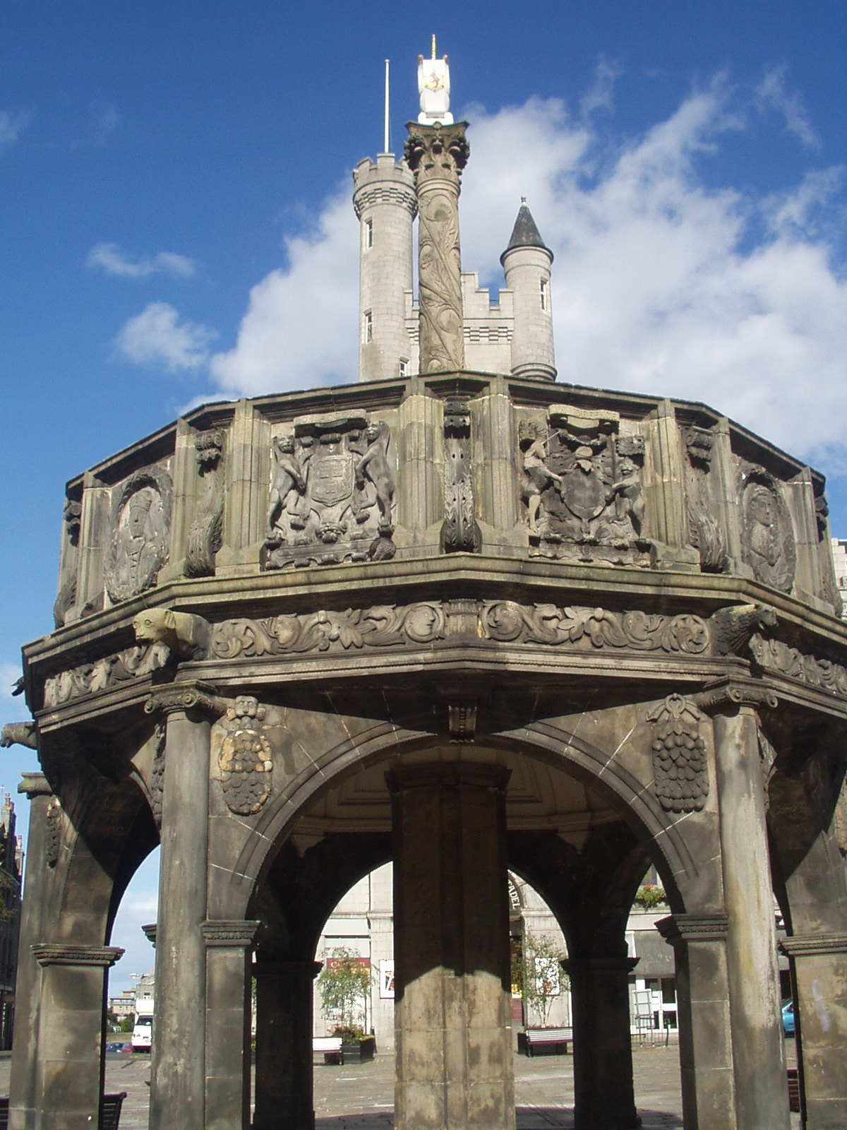 Aberdeen Market Cross, August 2004